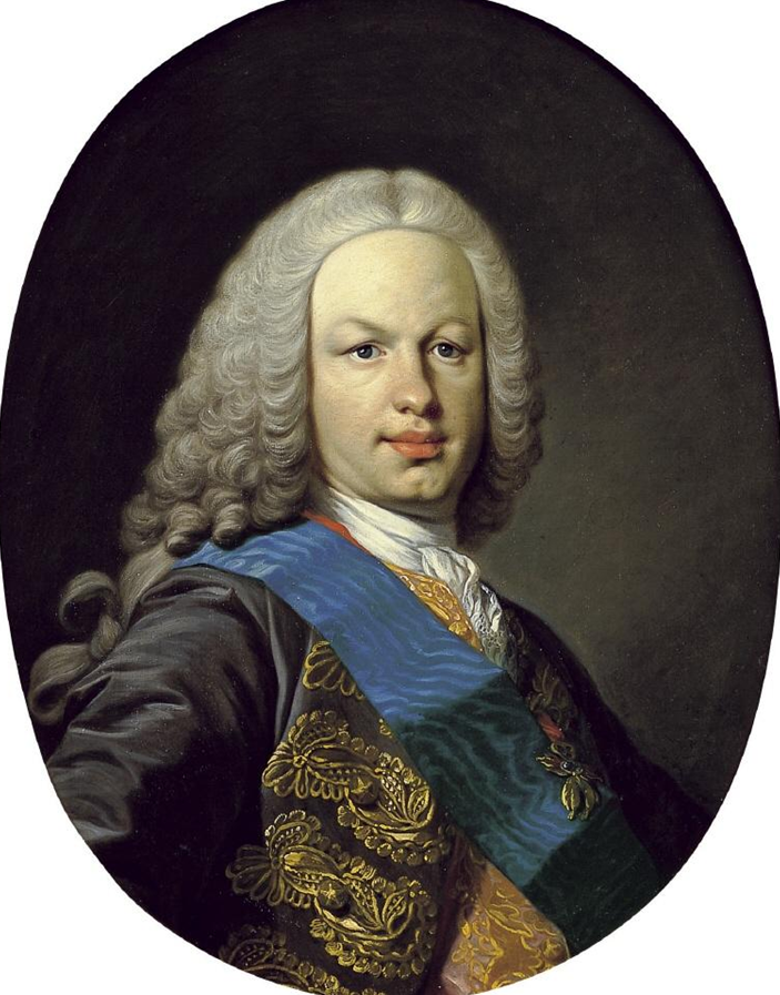 Retrato del rey Fernando VI de España (1713-1759), que fue hijo del rey Felipe V de España y de la reina María Luisa Gabriela de Saboya.